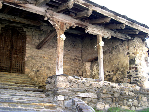 Porxo de l'església de Sant Joan de Caselles (parròquia de Canillo, Andorra)